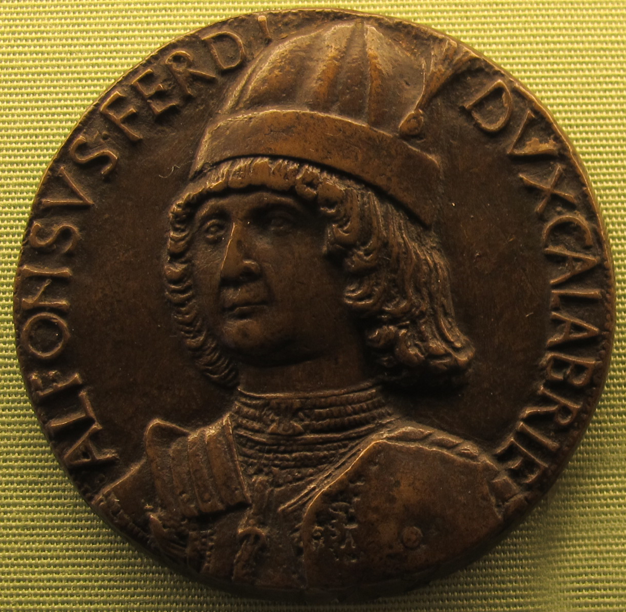 Alfonso d'Aragona, 1481